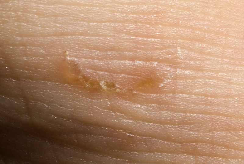 sarna, vease galeria